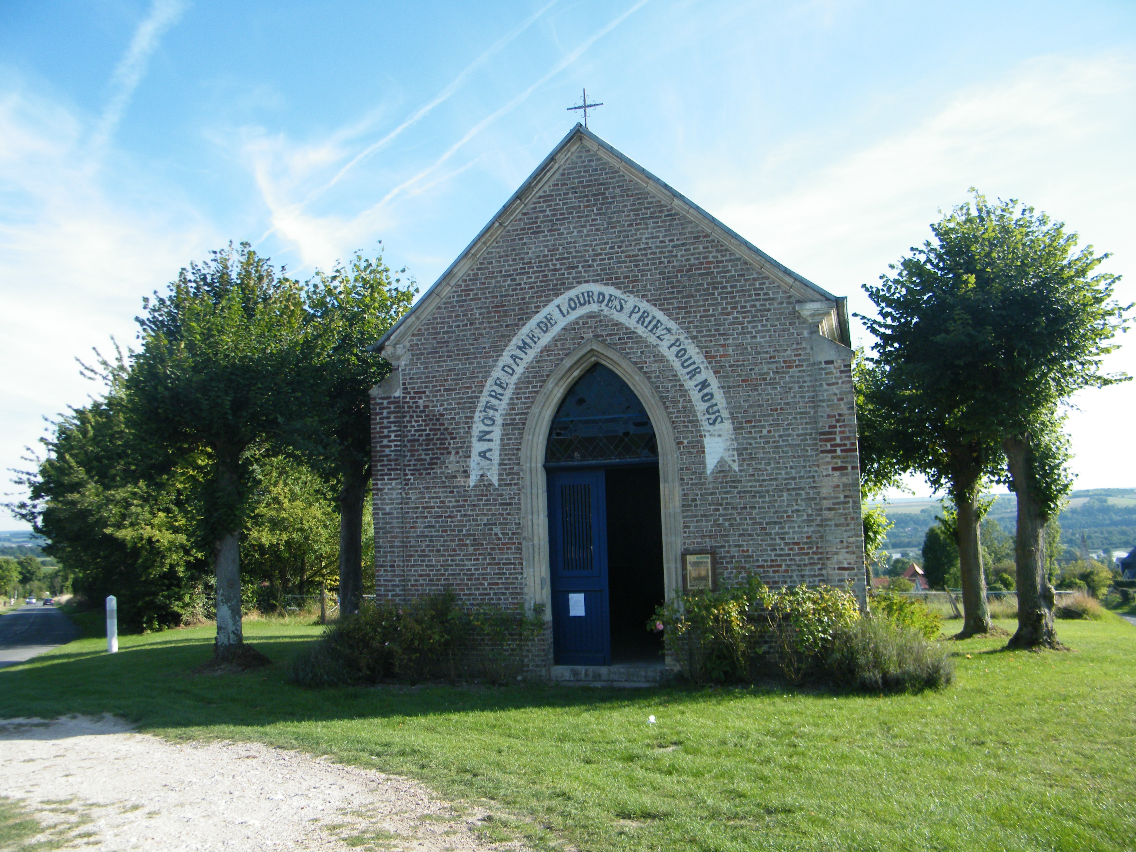 Long, Somme, Fr, chapelle N-D de Lourdes (3)